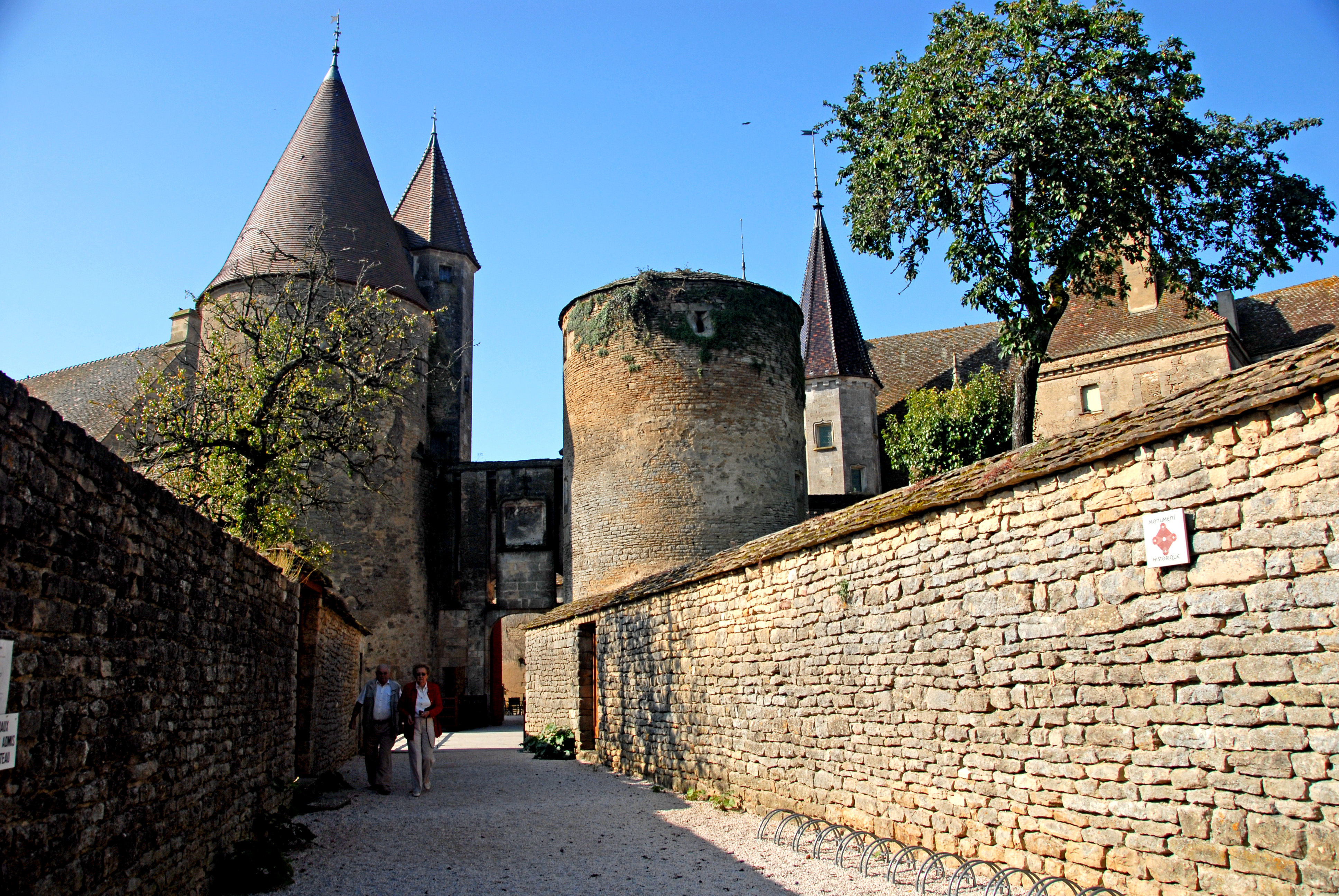 Schloss Châteauneuf, Schlosseingang